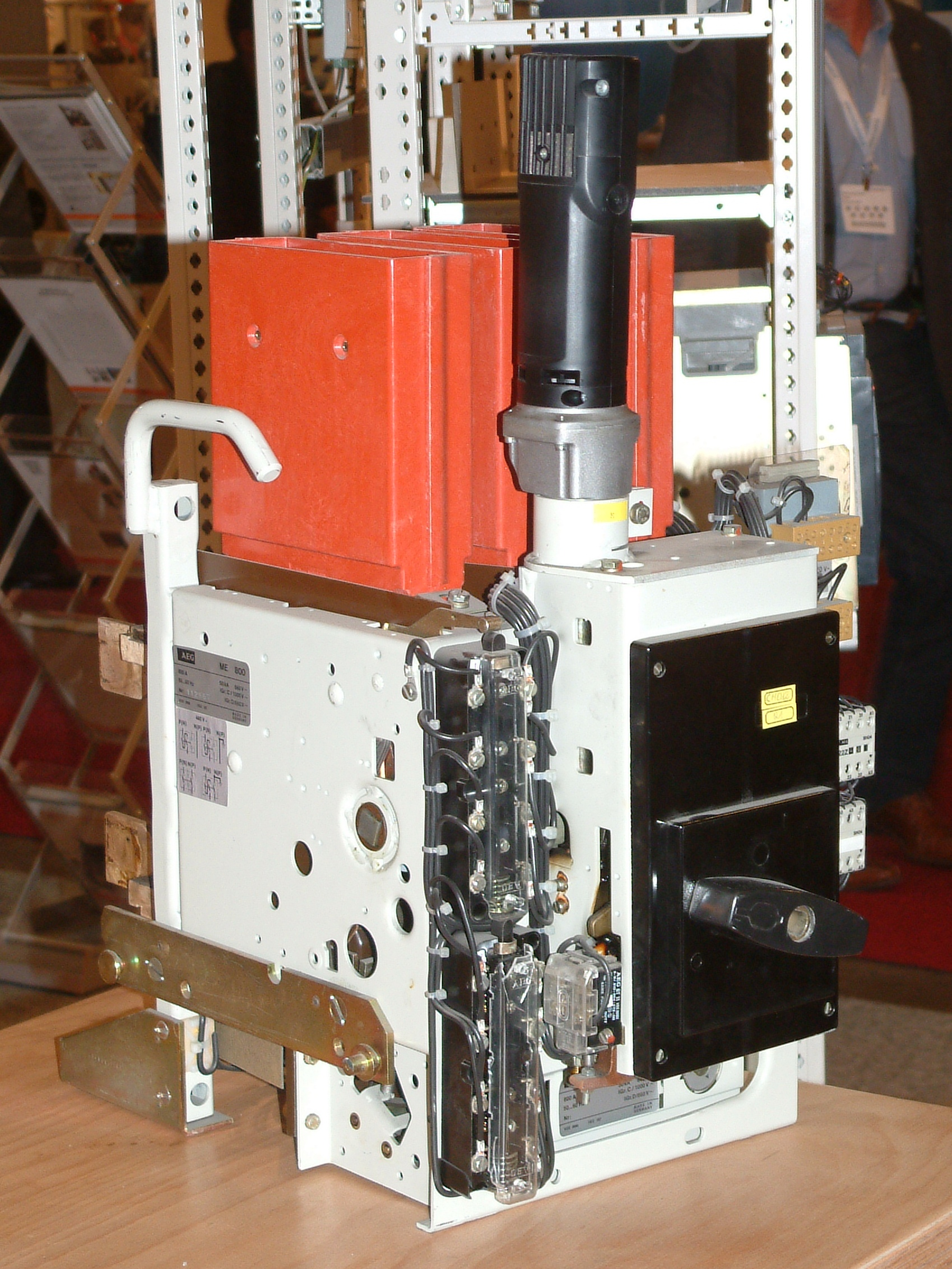 Old AEG Circuit breaker type ME 800 at Europort 2009